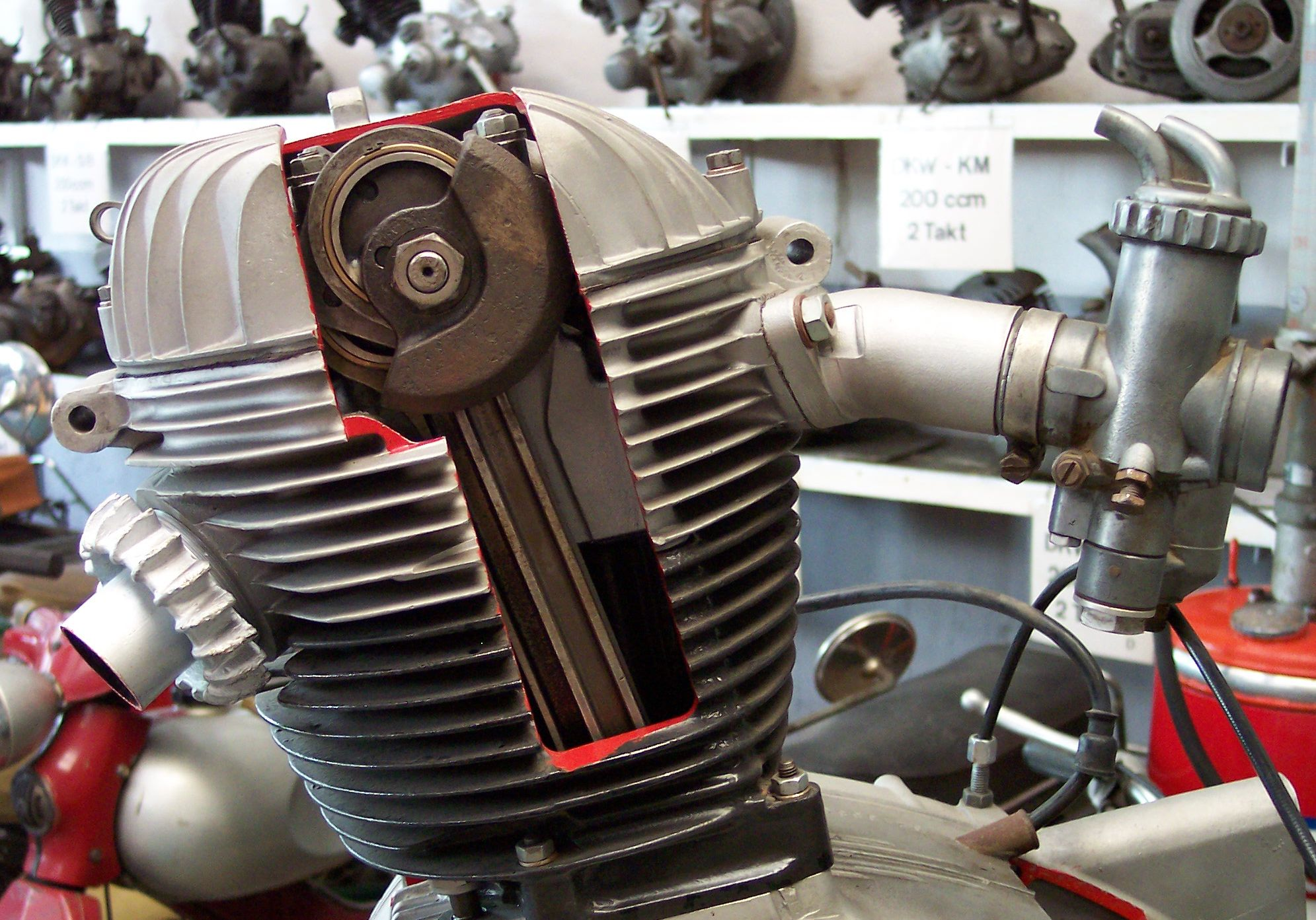 NSU Max Schubstangenantrieb zur Ventilsteuerung